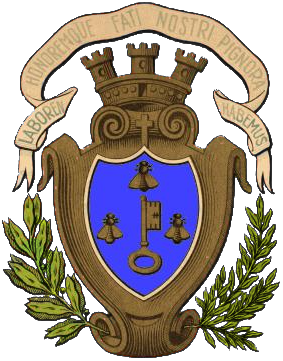 Blason de Philippeville (Skikda). Image:Coa Skikda.png avec fond transparent